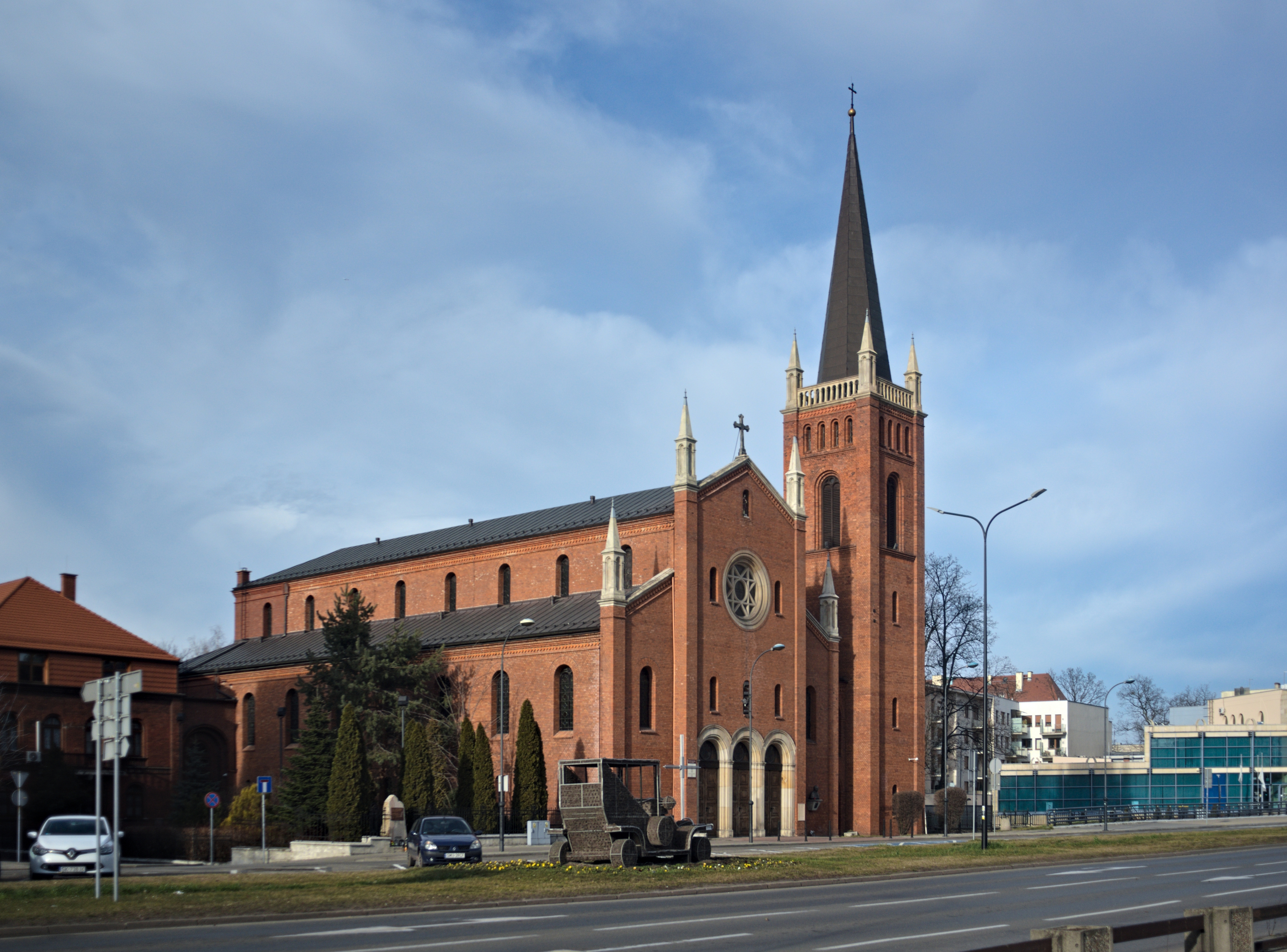 kościół św. Barbary w Gliwicach, widok z południowego zachodu